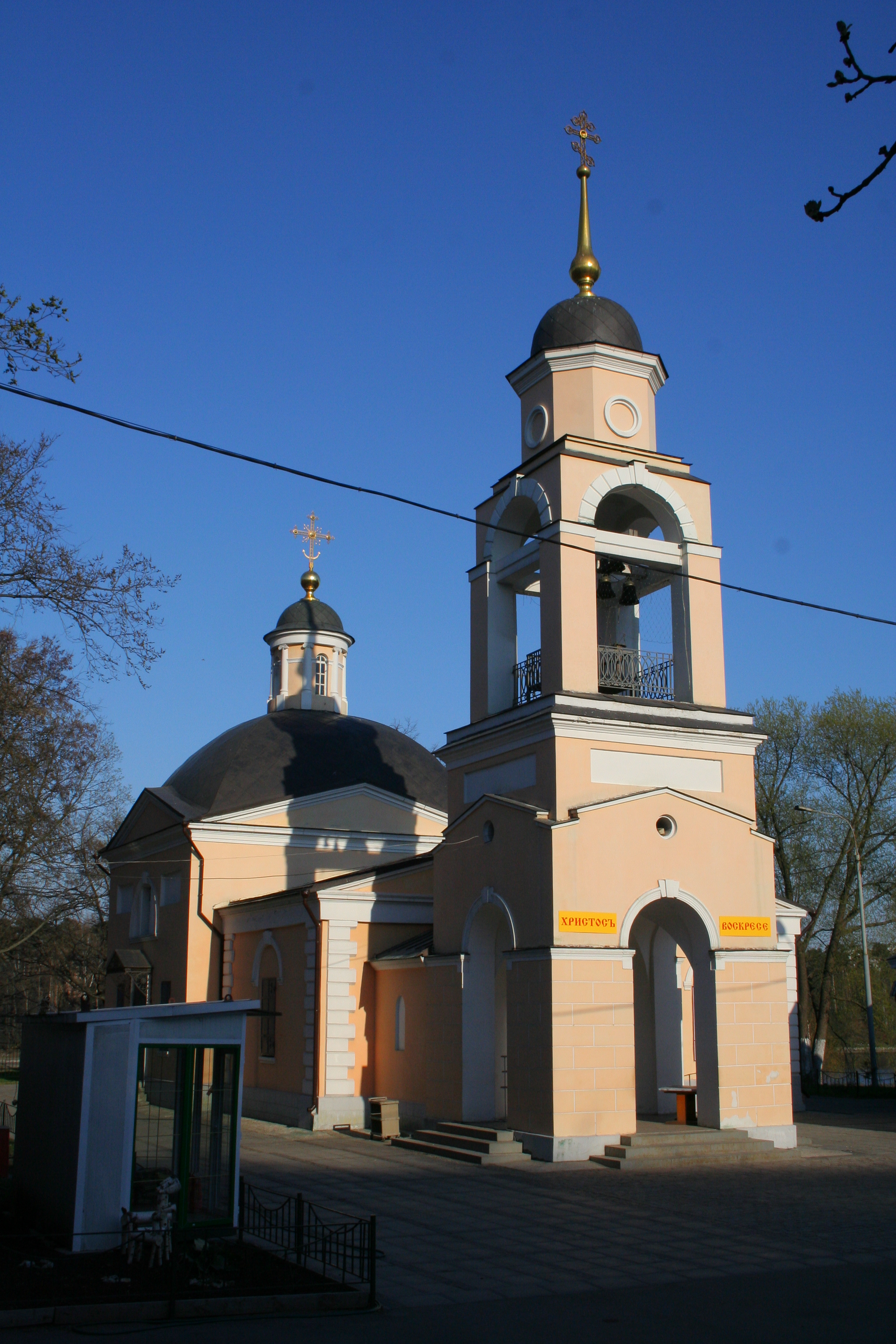 Kirche der Heiligen Cosmas und Damian zu Kosmodemjanskoje, Moskau